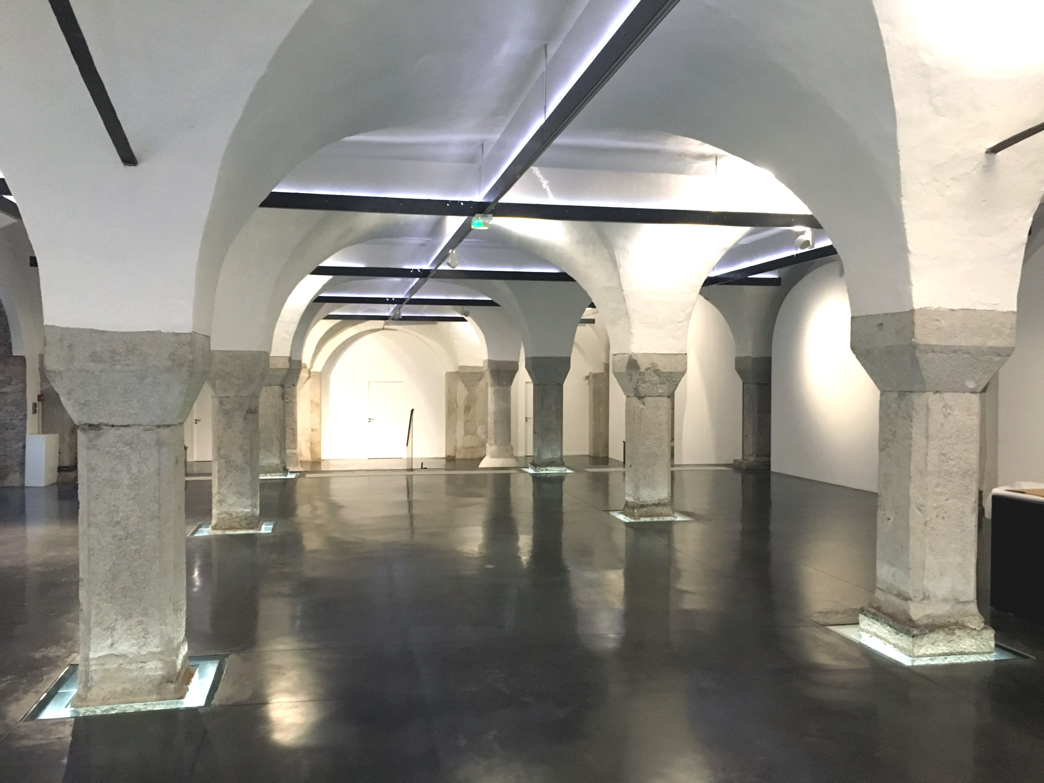 Vue de l'espace intérieur du Centre d'art contemporain La Halle des bouchers, Vienne (Isère)